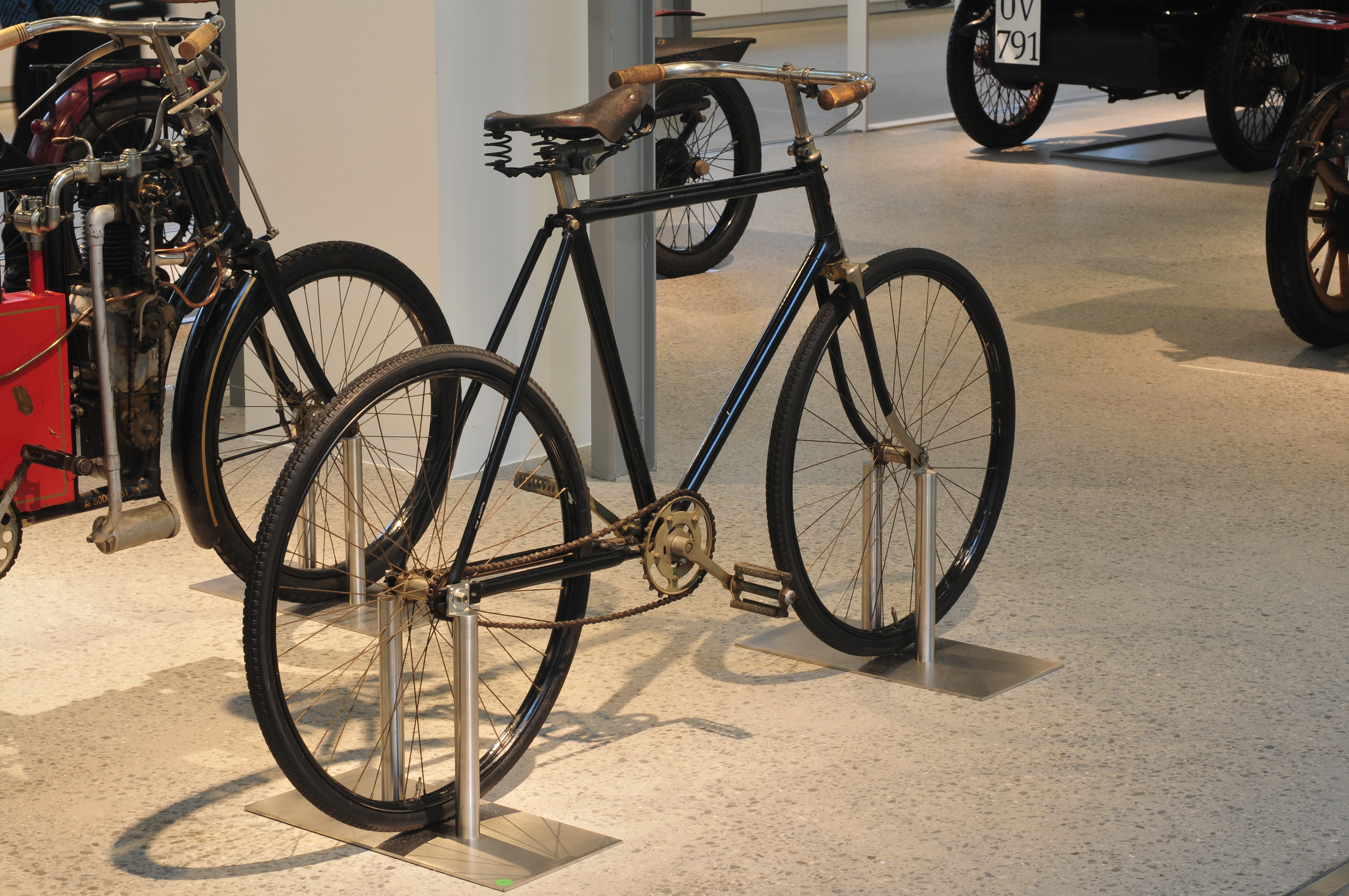 Fototermin Škoda Museum Mladá Boleslav 2013 Fototermin Škoda Muzeum 5. April 2013 in Mladá Boleslav This work is free and may be used by anyone for any purpose. If you wish to use this content, you do not need to request permission as long as you follow any licensing requirements mentioned on this page.